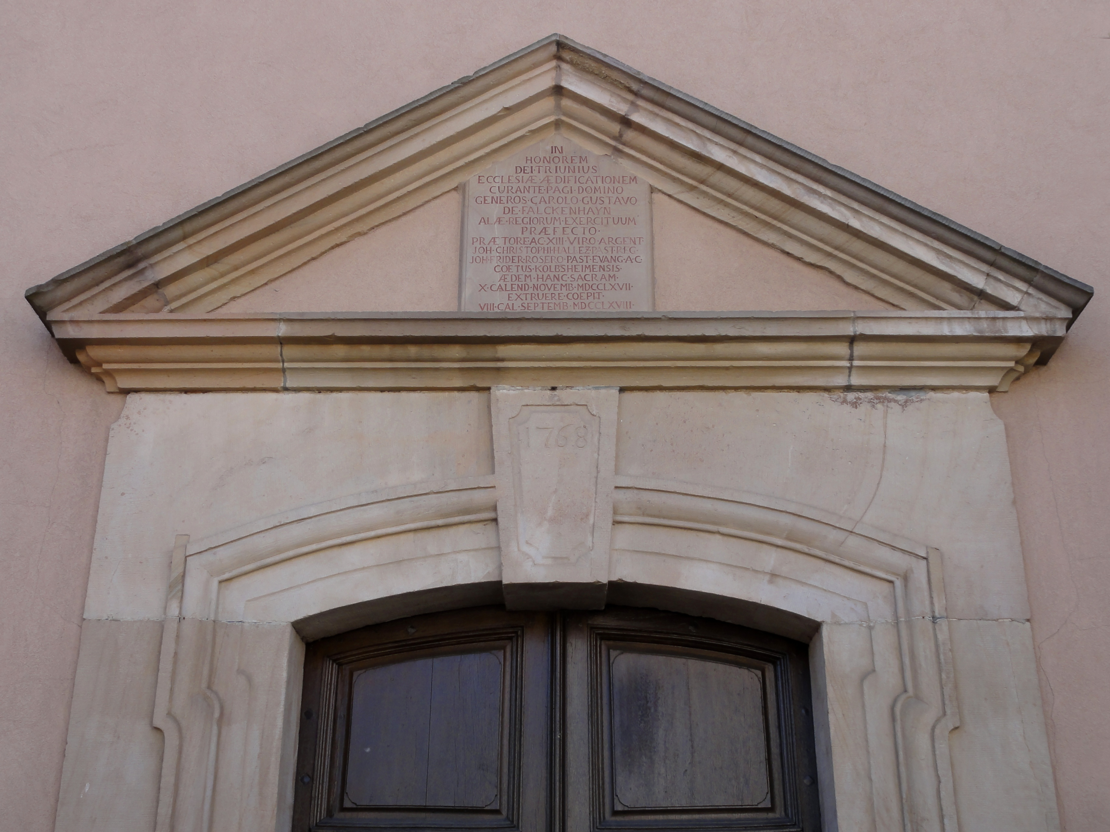 Alsace, Bas-Rhin, Église simultanée Saint-Léger de Kolbsheim (IA00023189).